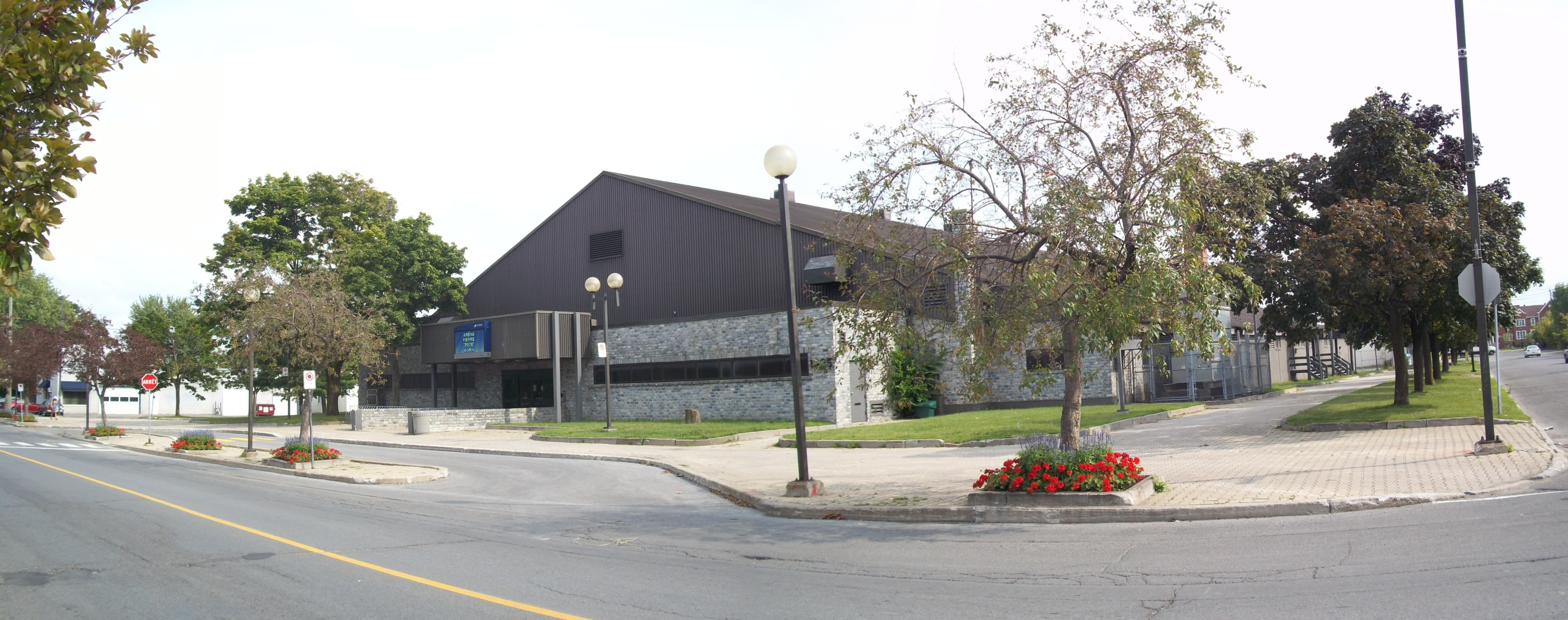 Aréna de Lachine, 1925, rue Saint-Antoine, Lachine, Montréal